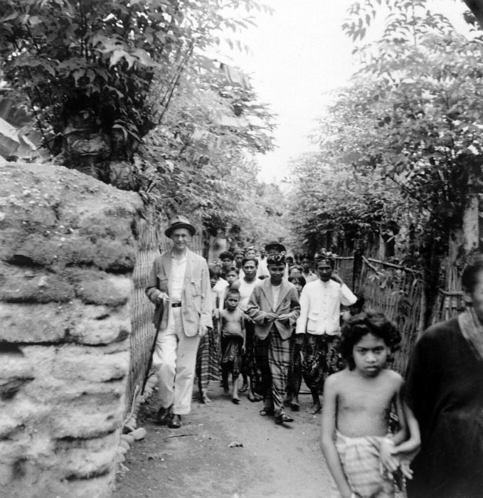 Repronegatief. Professor Kleiweg de Zwaan tijdens een bezoek aan Pringgabaja